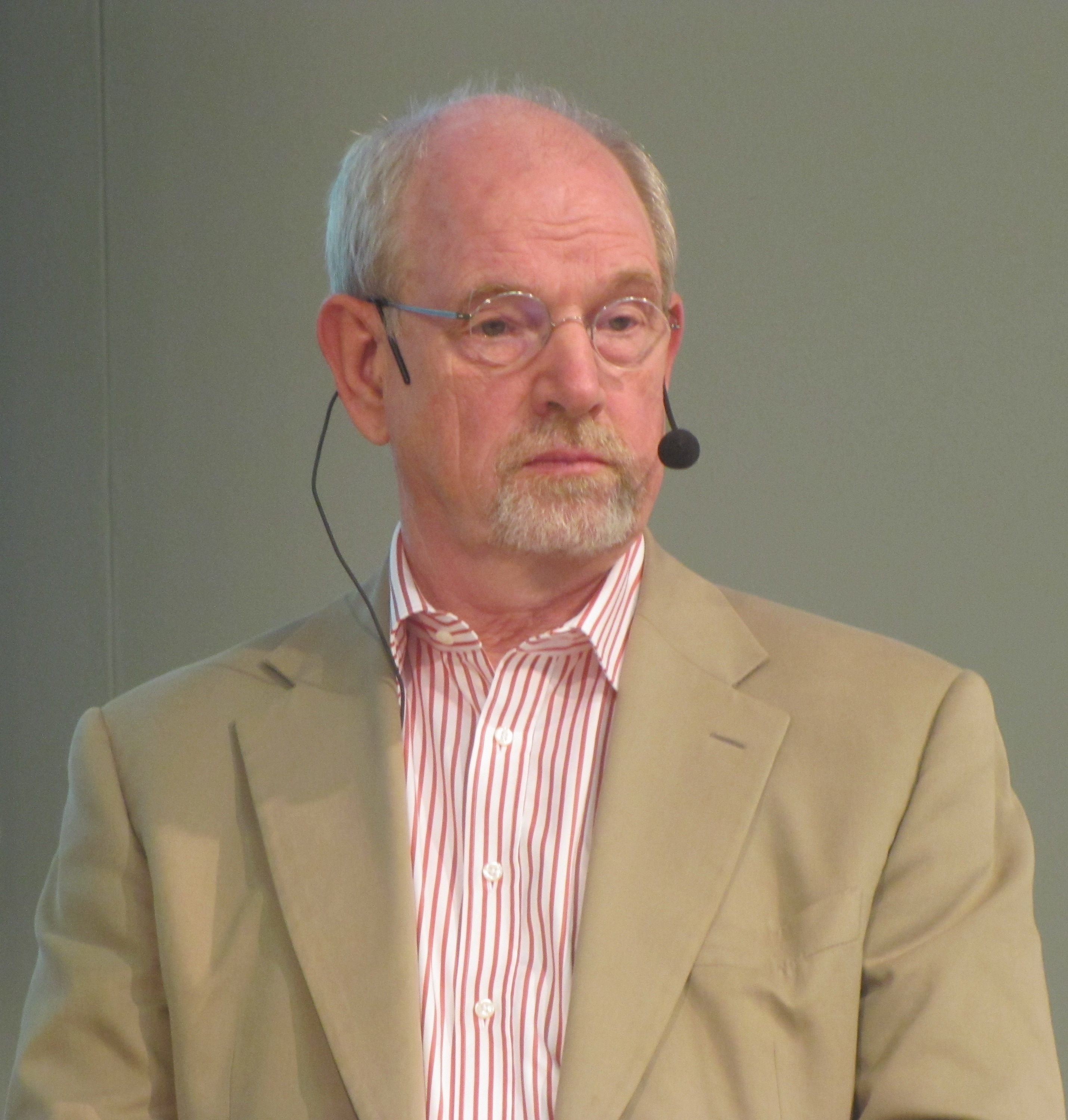 Historikern Hans De Geer föreläser på Bokmässan 2010 om "Statliga företag och staten som ägare".